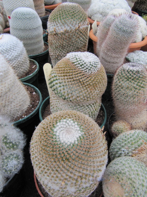 Mamillaria huitzilopochtli